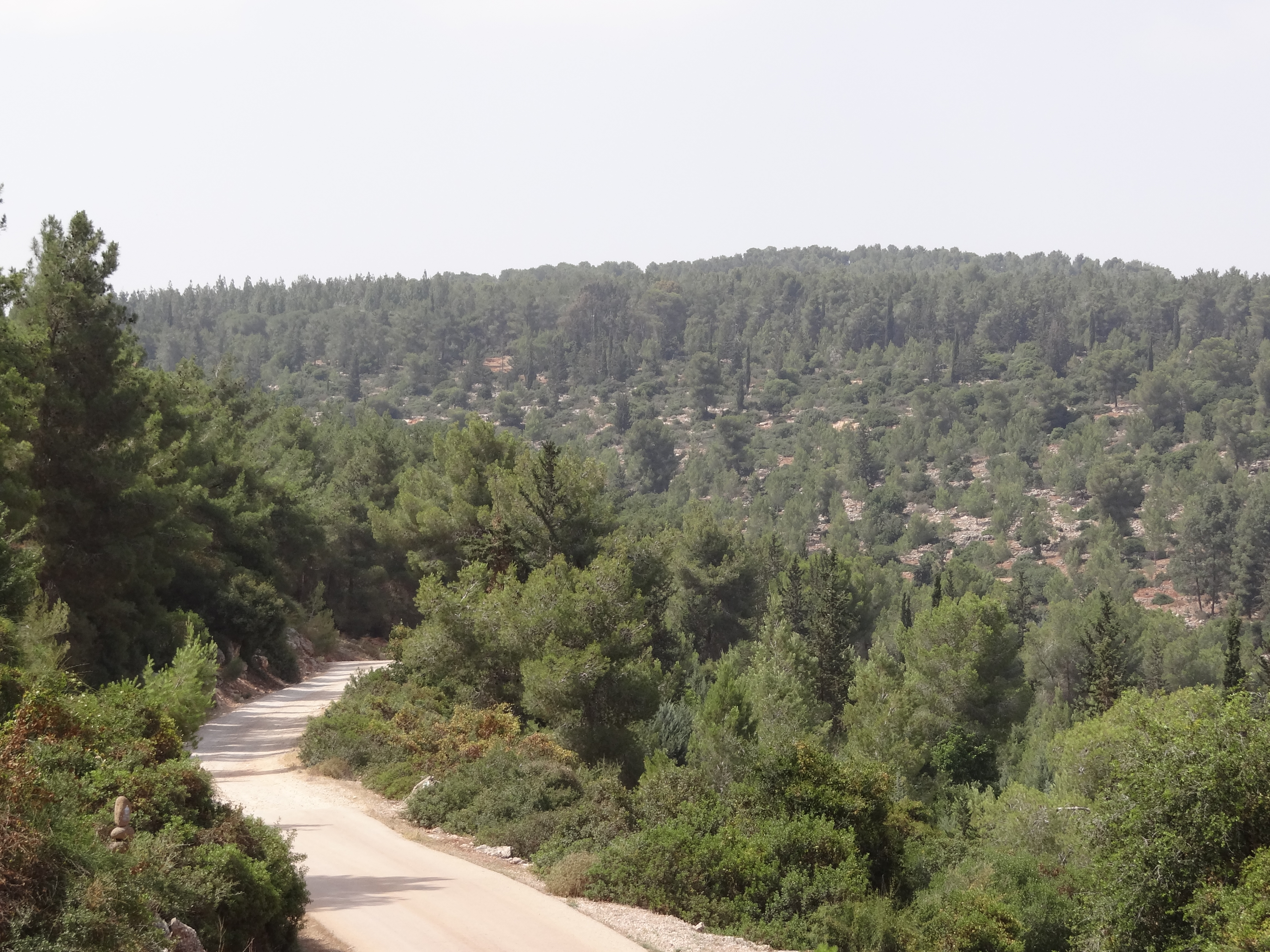 דרך נוף יער בית קשת